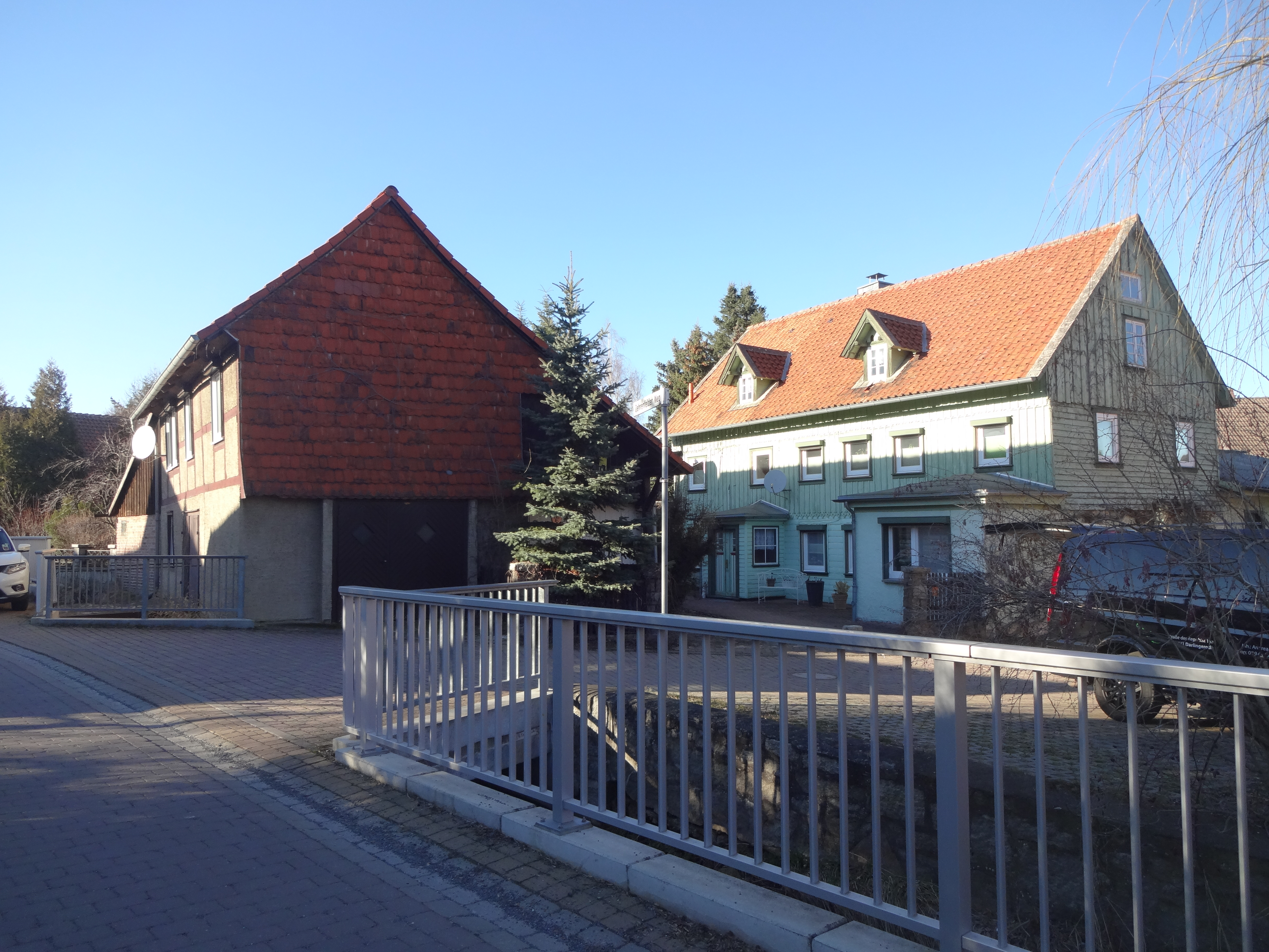 denkmalgeschützter ehemaliger Gasthof im Oehrenfelder Weg 4 in Darlingerode